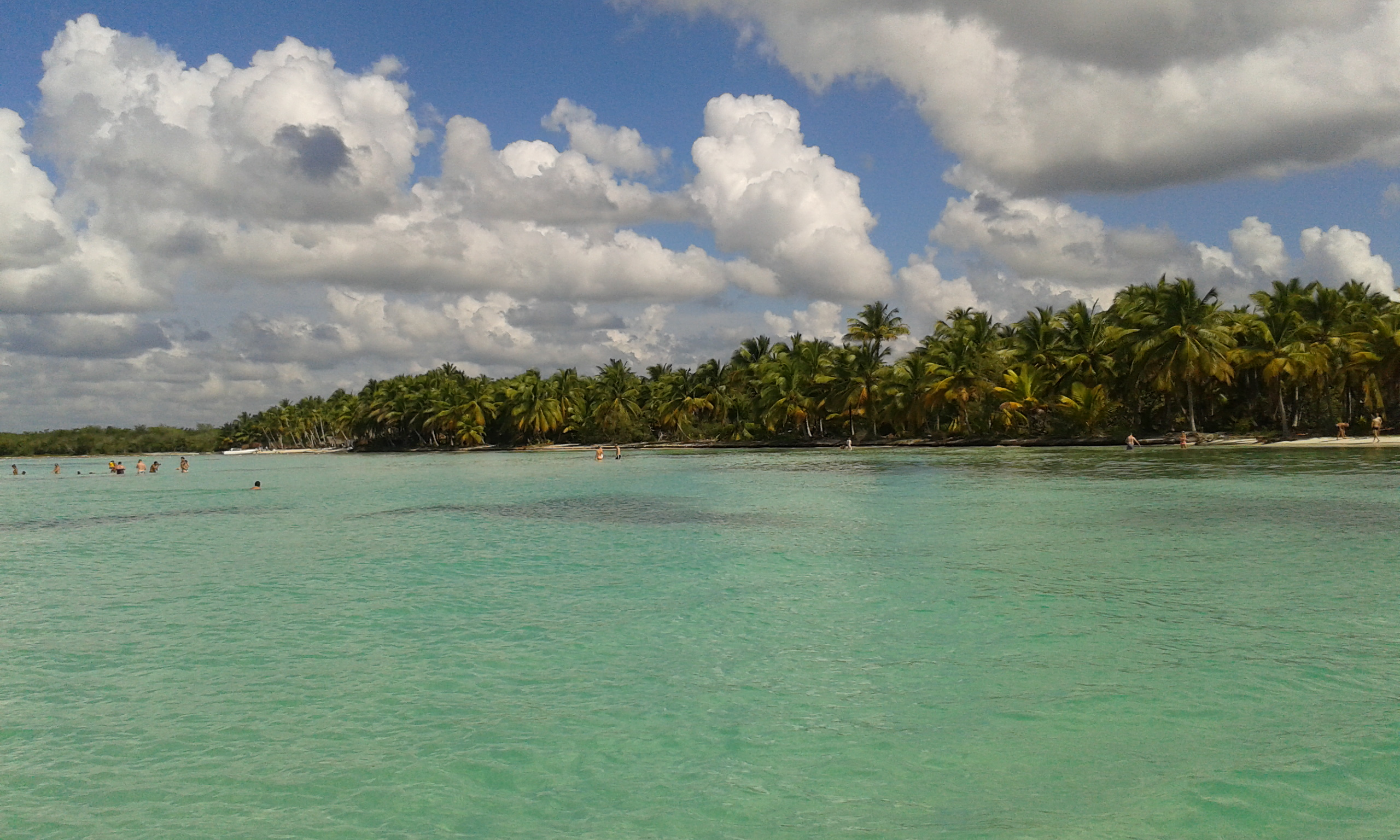 Imagen tomada desde un barco, próximo a la Isla Saona en República Dominicana.